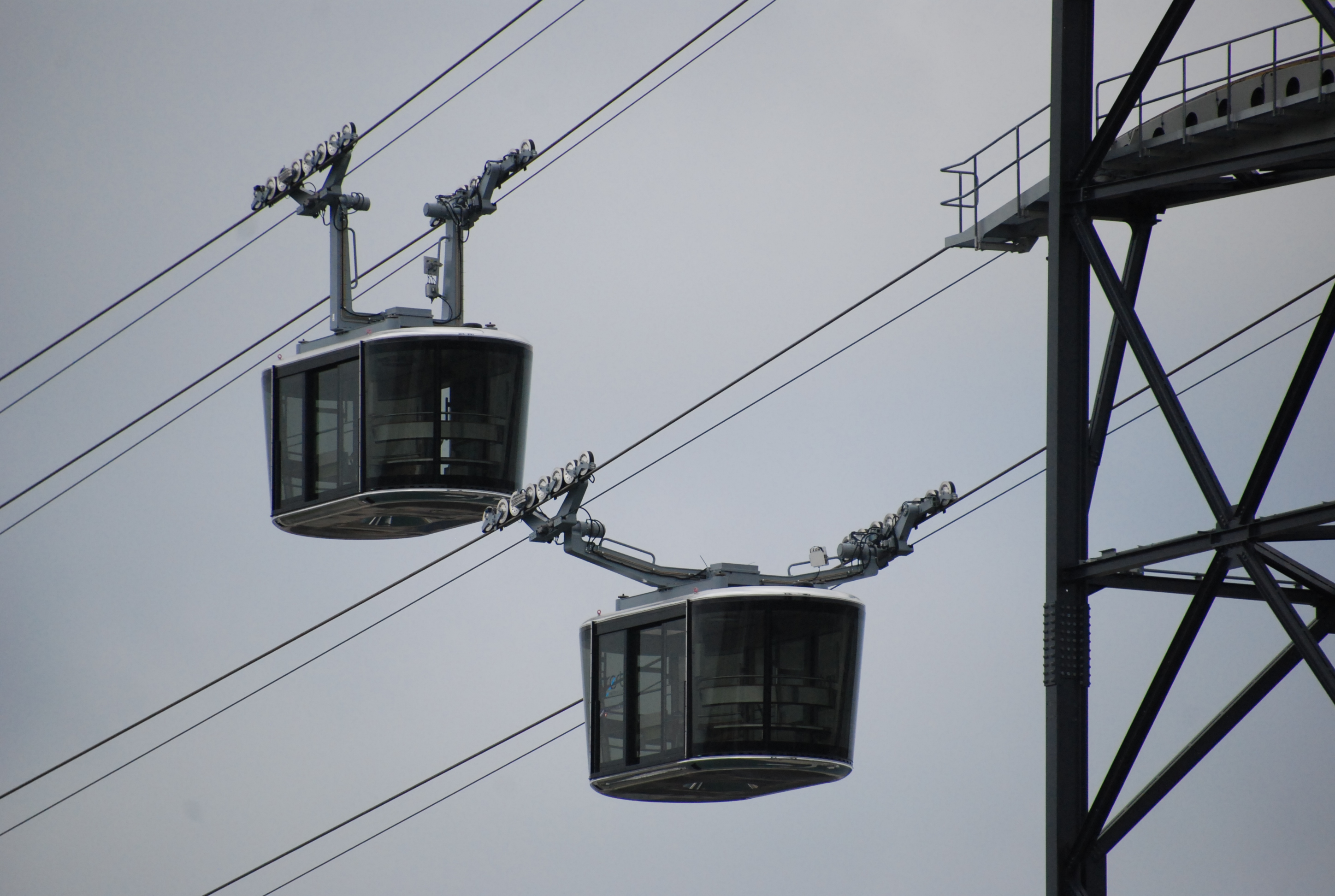 Test du téléphérique de Brest - Fin septembre 2016